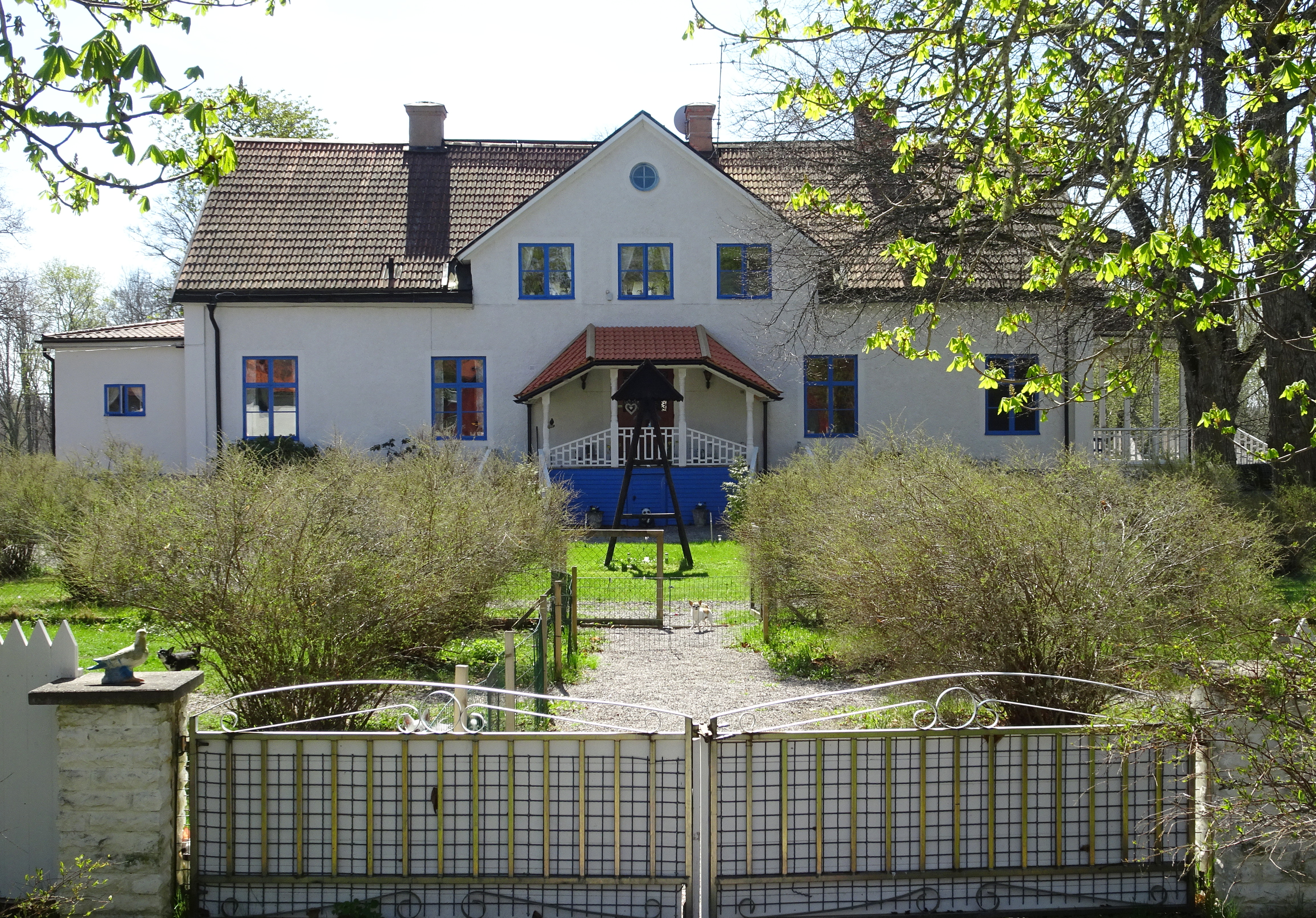 Näsbyholms säteri, huvudbyggnad